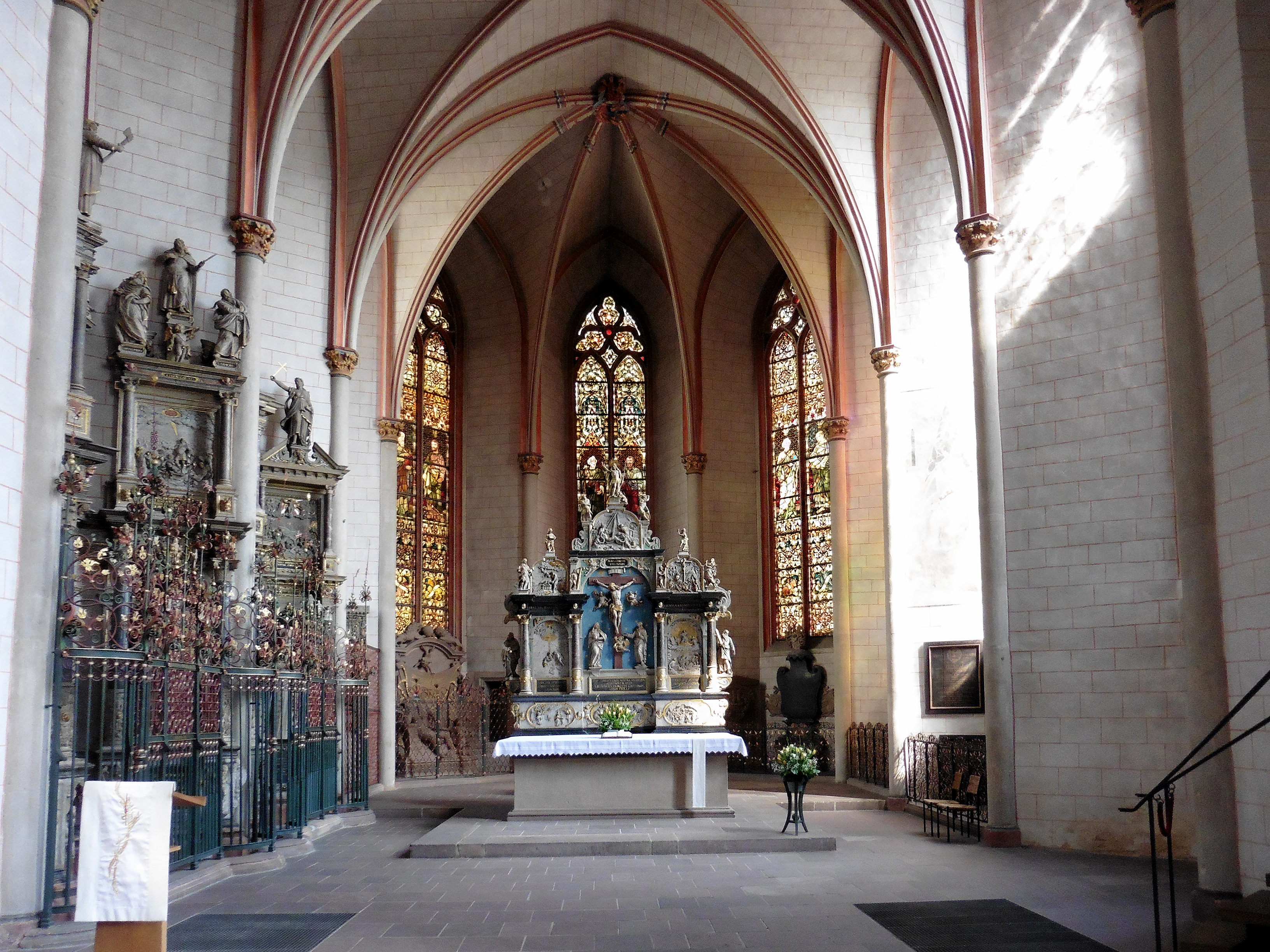 Chor der Lutherischen Pfarrkirche in Marburg. Ansicht von Westsüdwest.